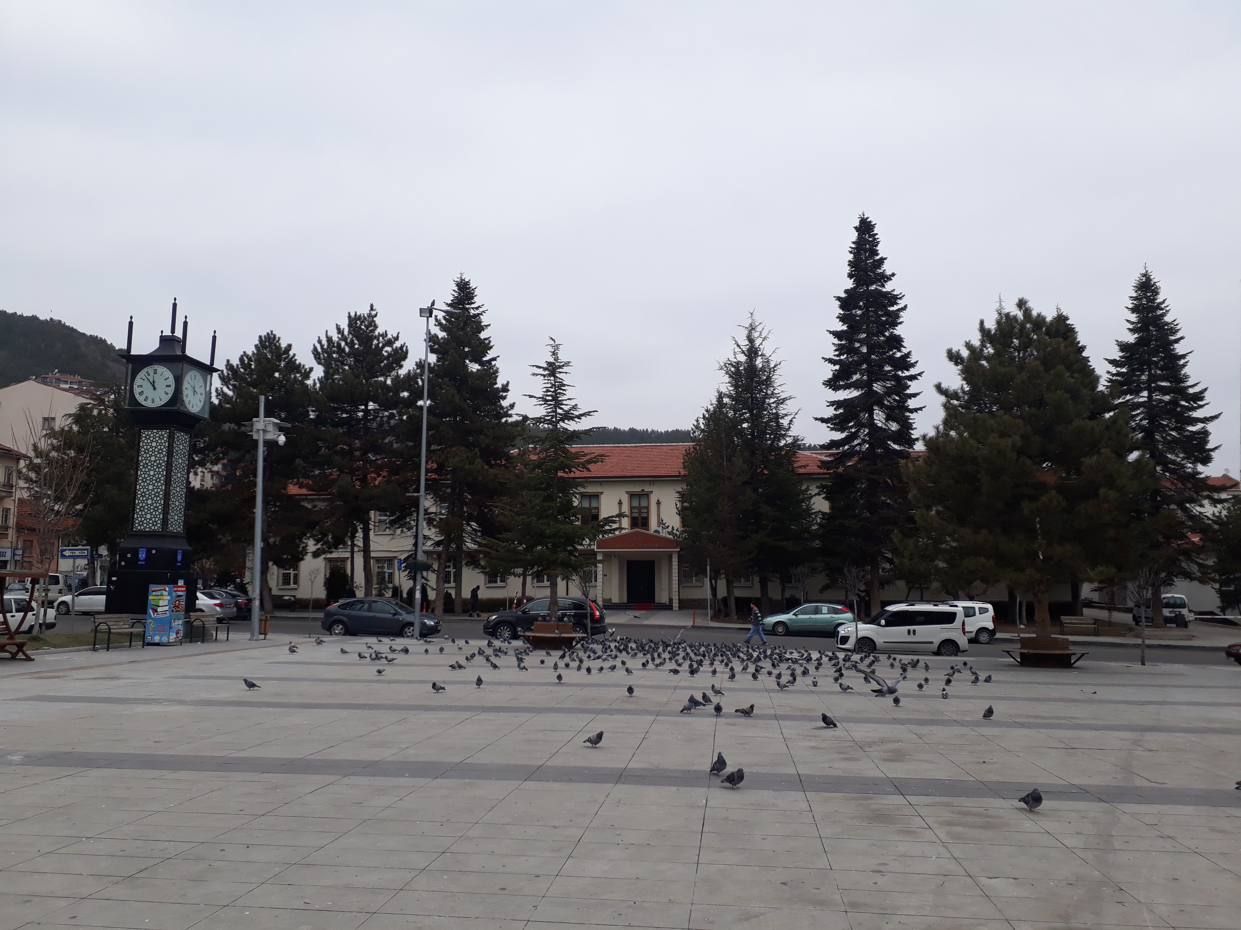 Kızılcahamam ilçe kaymakamlığı, Kızılcahamam, Ankara, Türkiye.